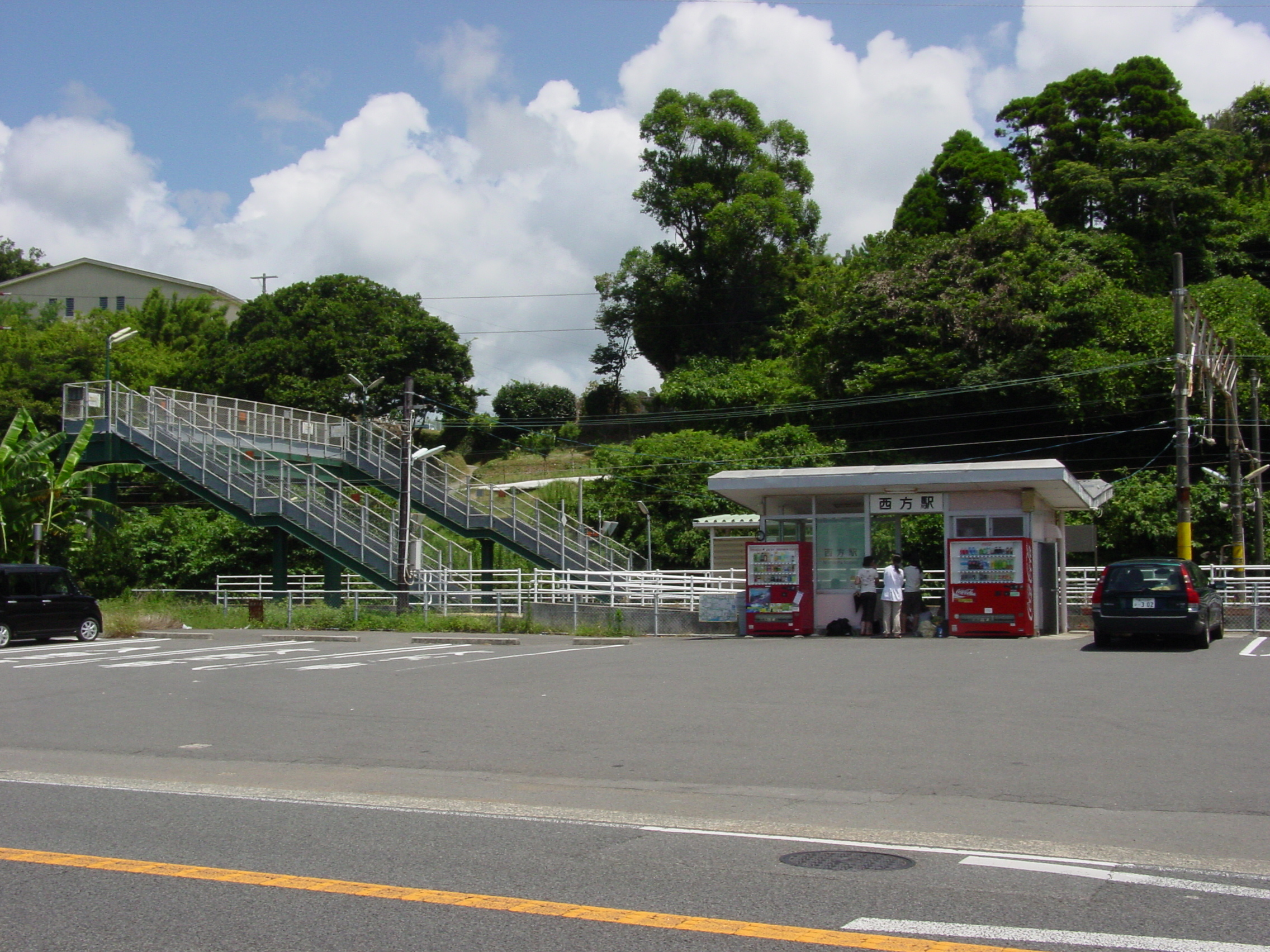 肥薩おれんじ鉄道西方（にしかた）駅前